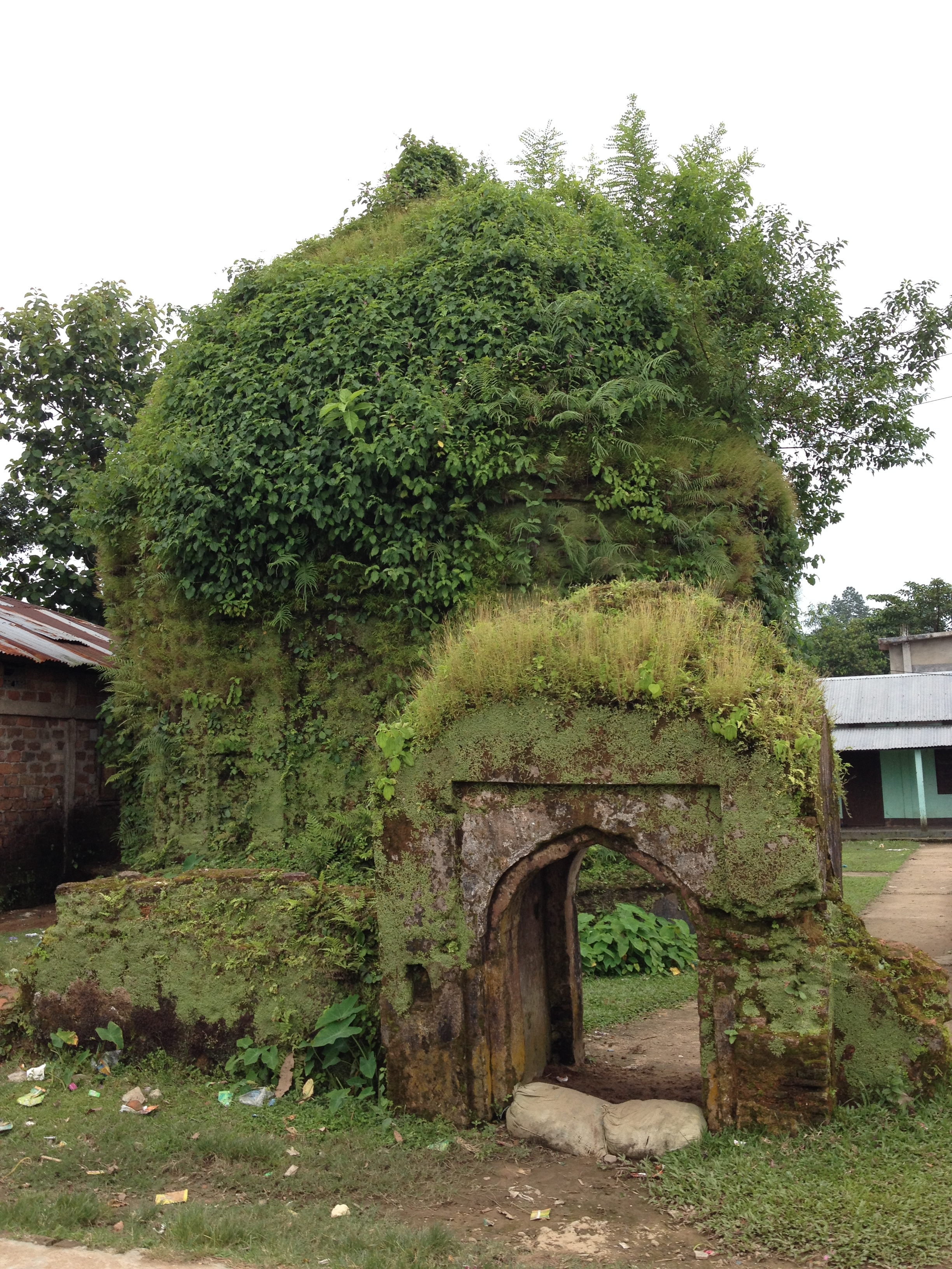 জয়েন্তশ্বরী বাড়ি